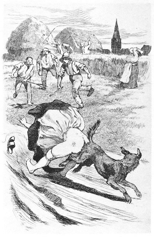 Dessins de Martin van Maele. Illustration de La Grande Danse macabre des vifs, 1905.